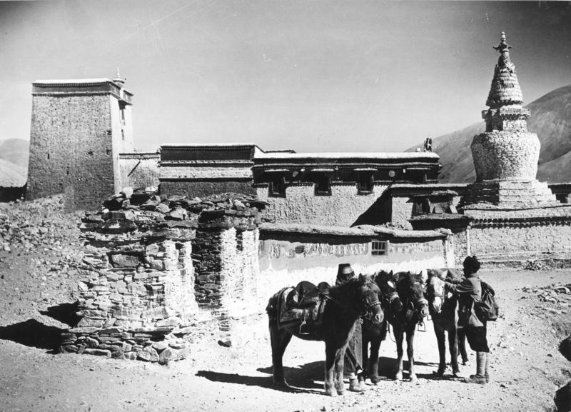 Tibetexpedition, Kloster in Samada Samada, Kloster in Samada